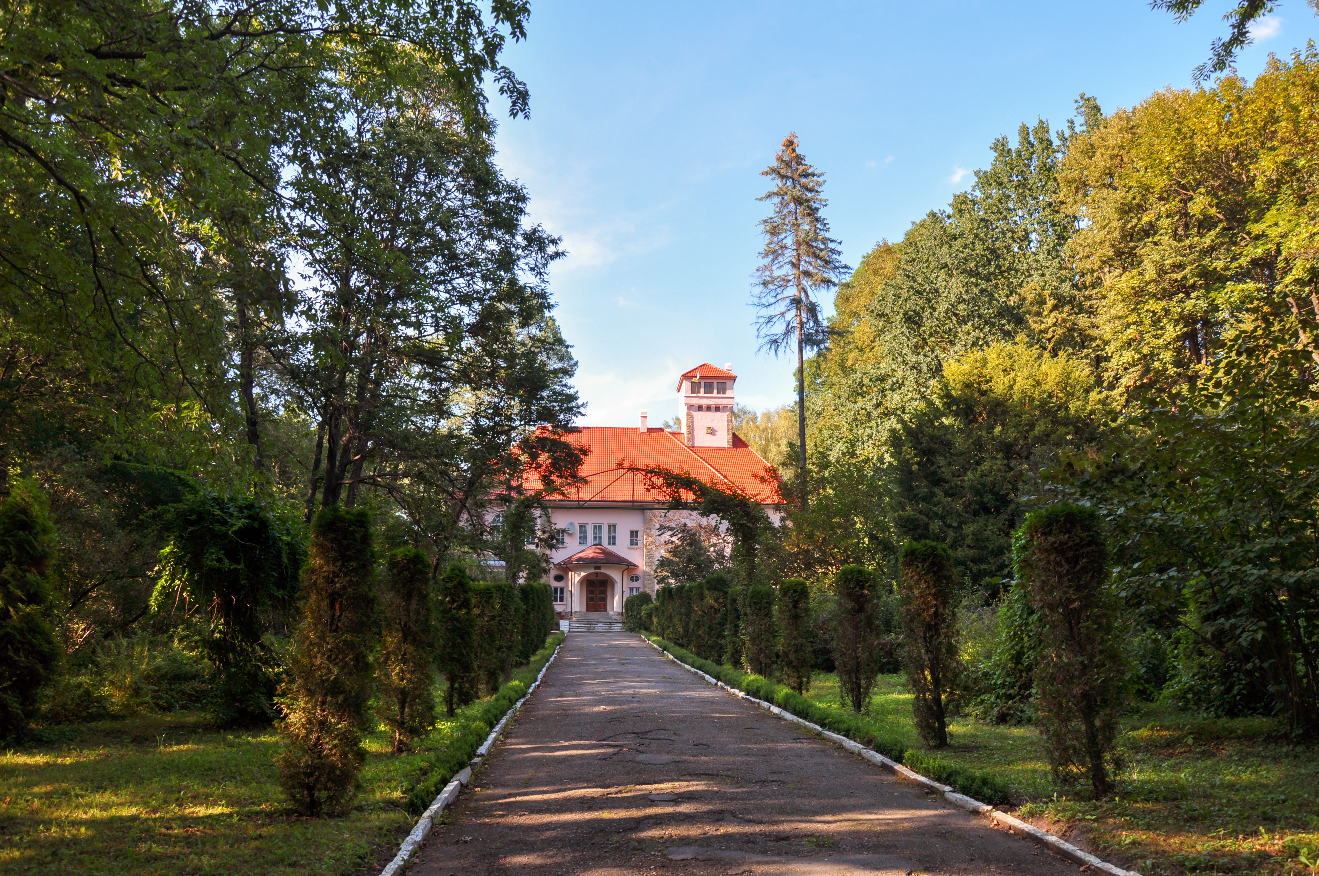 Сторожинецький, Сторожинецький район, м. Сторожинець